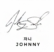 Автограф Джонни